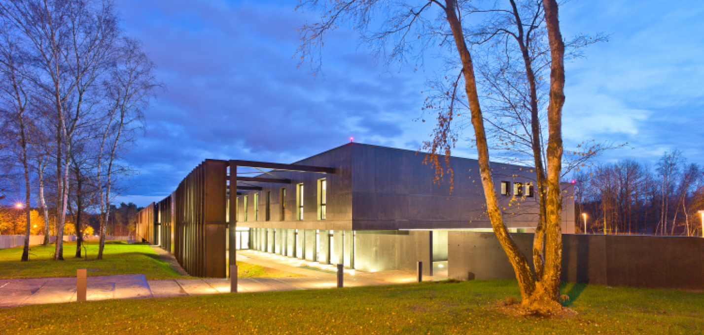 Campus Intégration Systèmes Embarqués